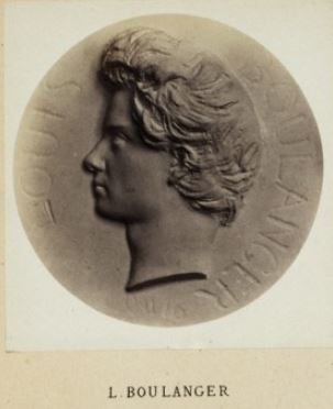 Louis Candide Boulanger (1806-1867) in Les médaillons de David d'Angers réunis et publiés par son fils Robert David d'Angers, 1867 (BNF/Gallica)